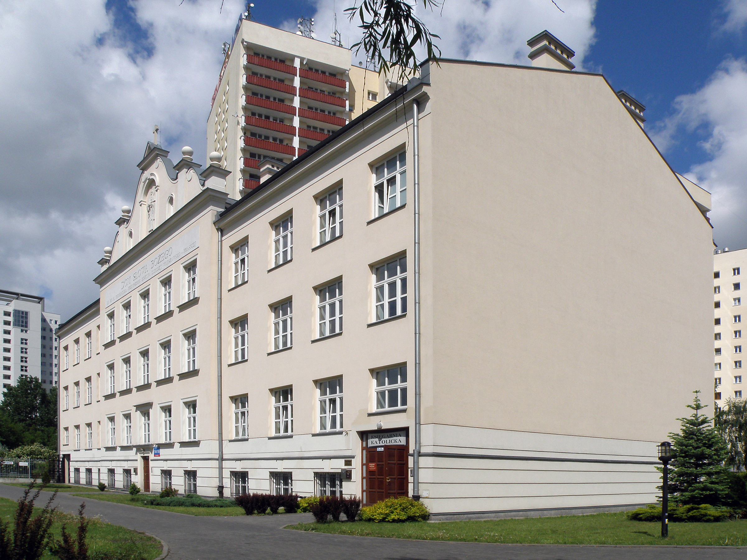 Budynek zakładu wychowawczego albertynów (Dom Słowa Bożego), 1931-34, ul. Grochowska 194/196 (dec. 527/06 z 22.03.2006), Warszawa.